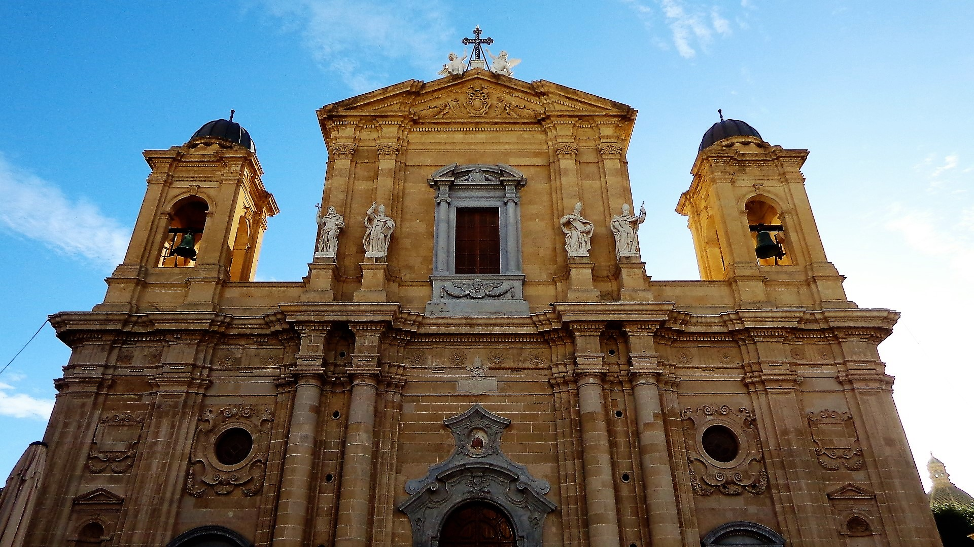 Facciata